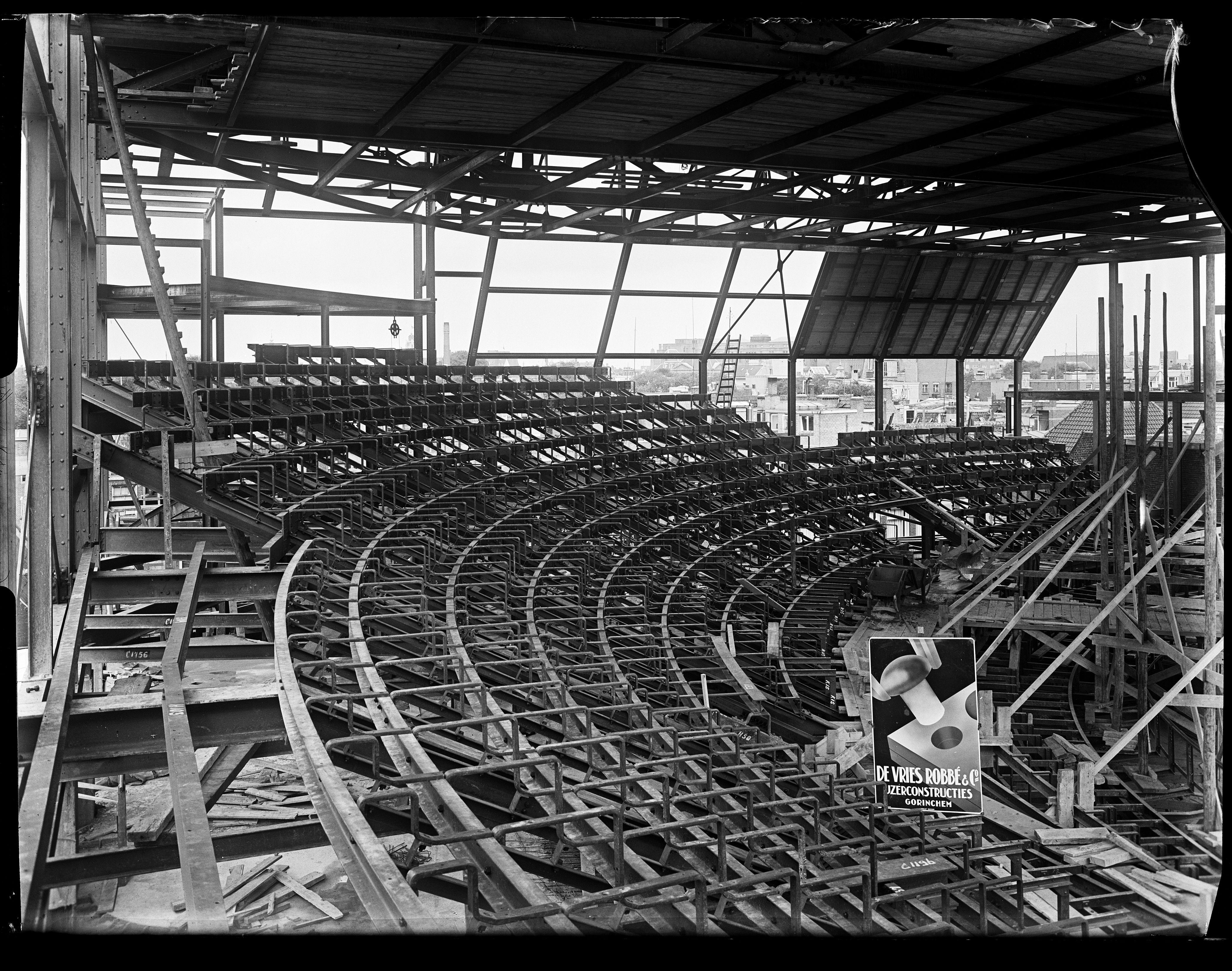 Beschrijving Kleine-Gartmanplantsoen 15-19 Het interieur van het City Theater in aanbouw. Documenttype foto Vervaardiger Guermonprez, Paul Collectie Collectie Paul Guermonprez Datering 25 juli 1935 Geografische naam Kleine-Gartmanplantsoen Inventarissen Afbeeldingsbestand 010016000227 Generated with Dememorixer